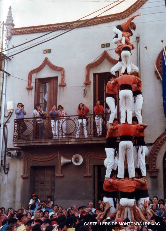 3 de 7 Castellers de Montcada